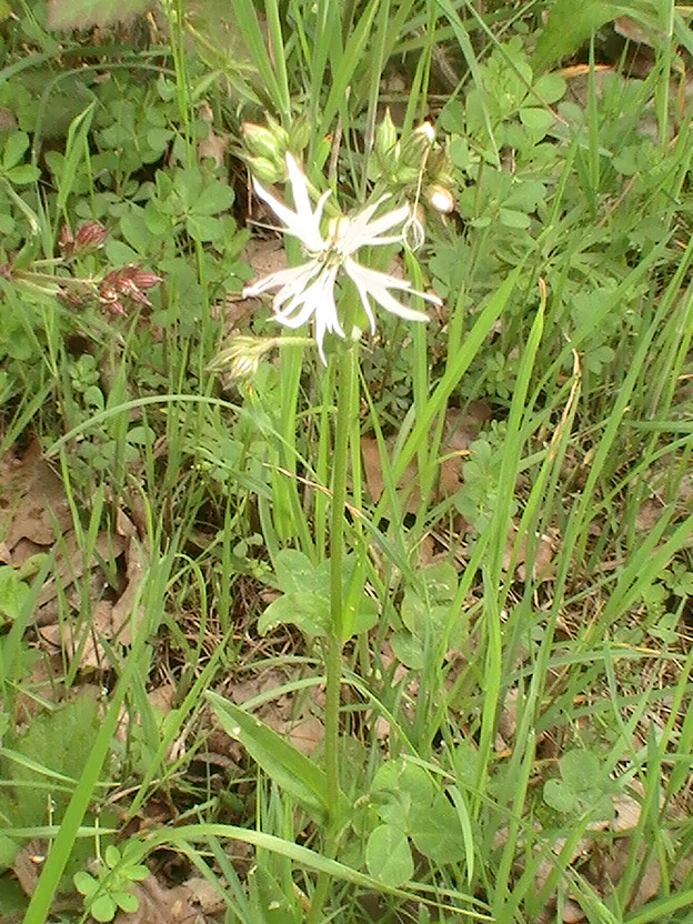 Kuckucks-Lichtnelke mit weißer Blüte - jedes Jahr am gleichen Standort